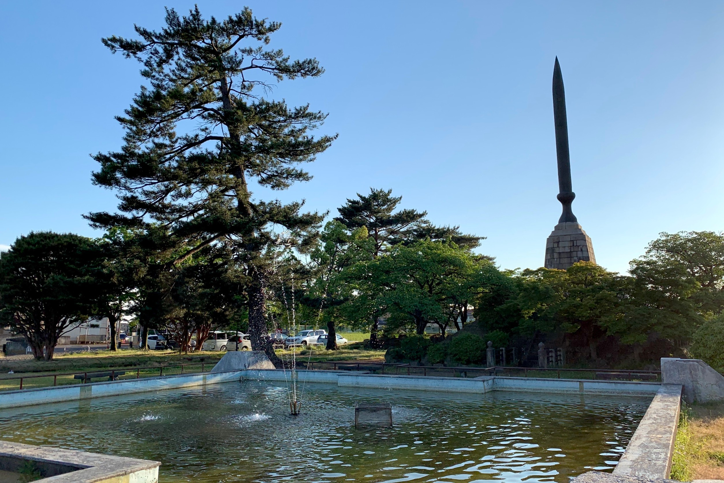 新発田西公園の噴水と越佐招魂碑（2020年5月）